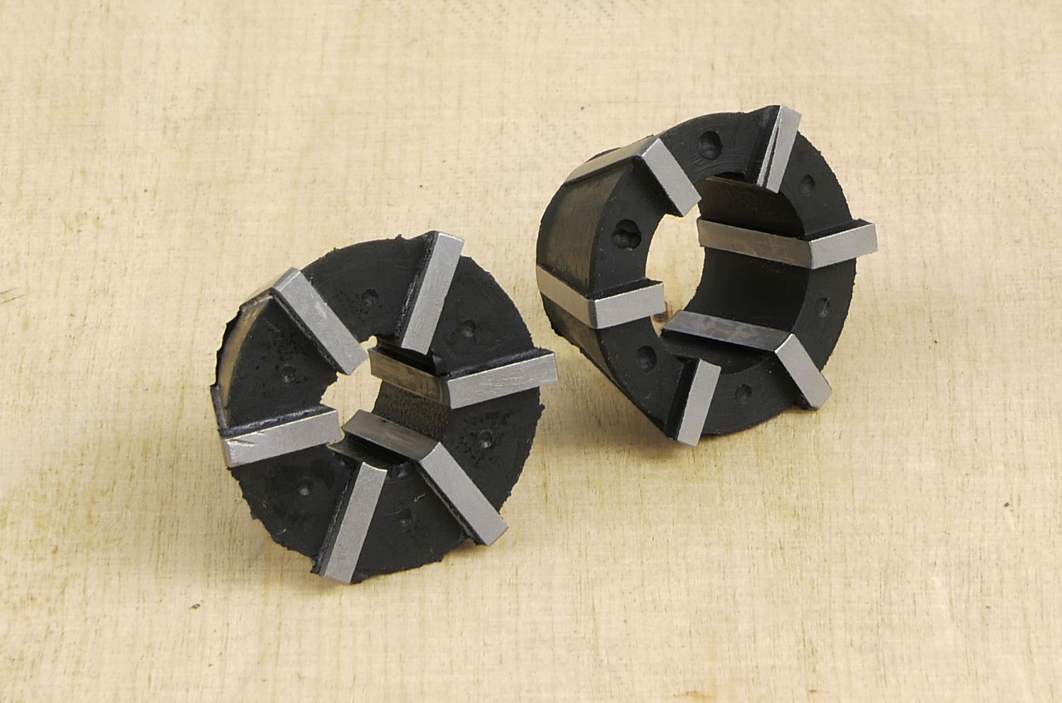 Tulejka gumowo - stalowa służąca do mocowania m.in. gwintowników.